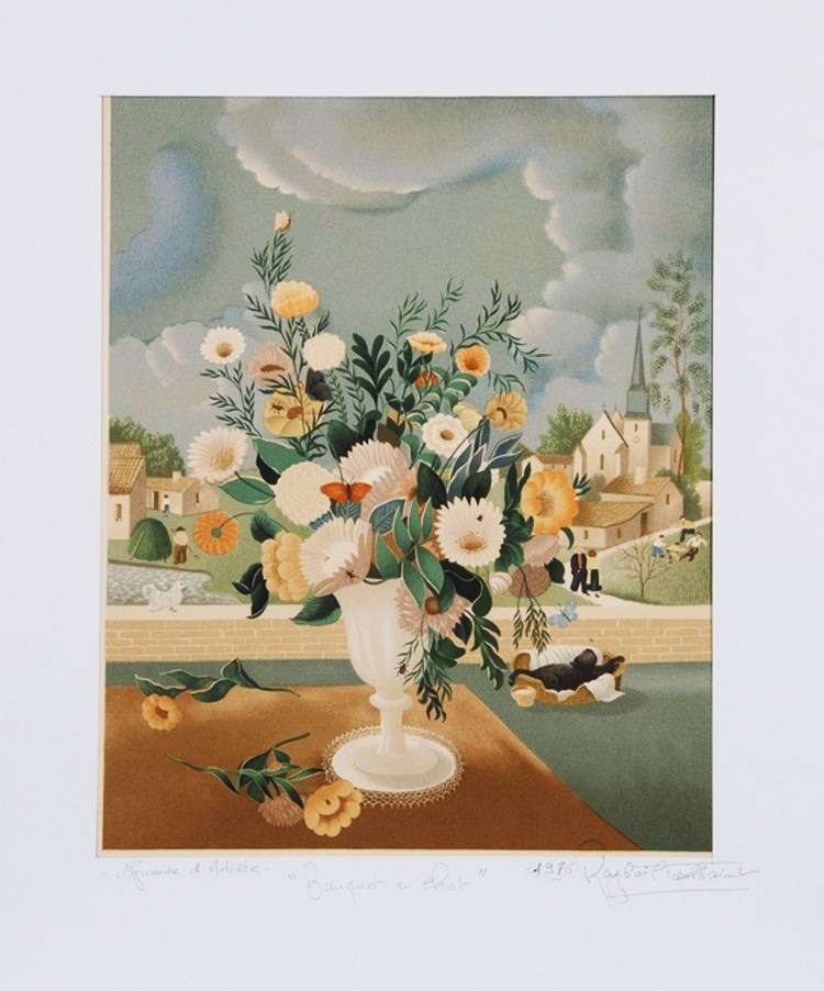 Lithographie par le peintre français Raphaël Toussaint intitulée Bouquet au Chat. 60x50cm.